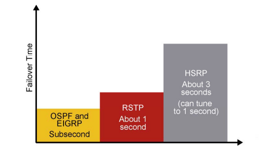 Монгол: яыбхбабжбжубу